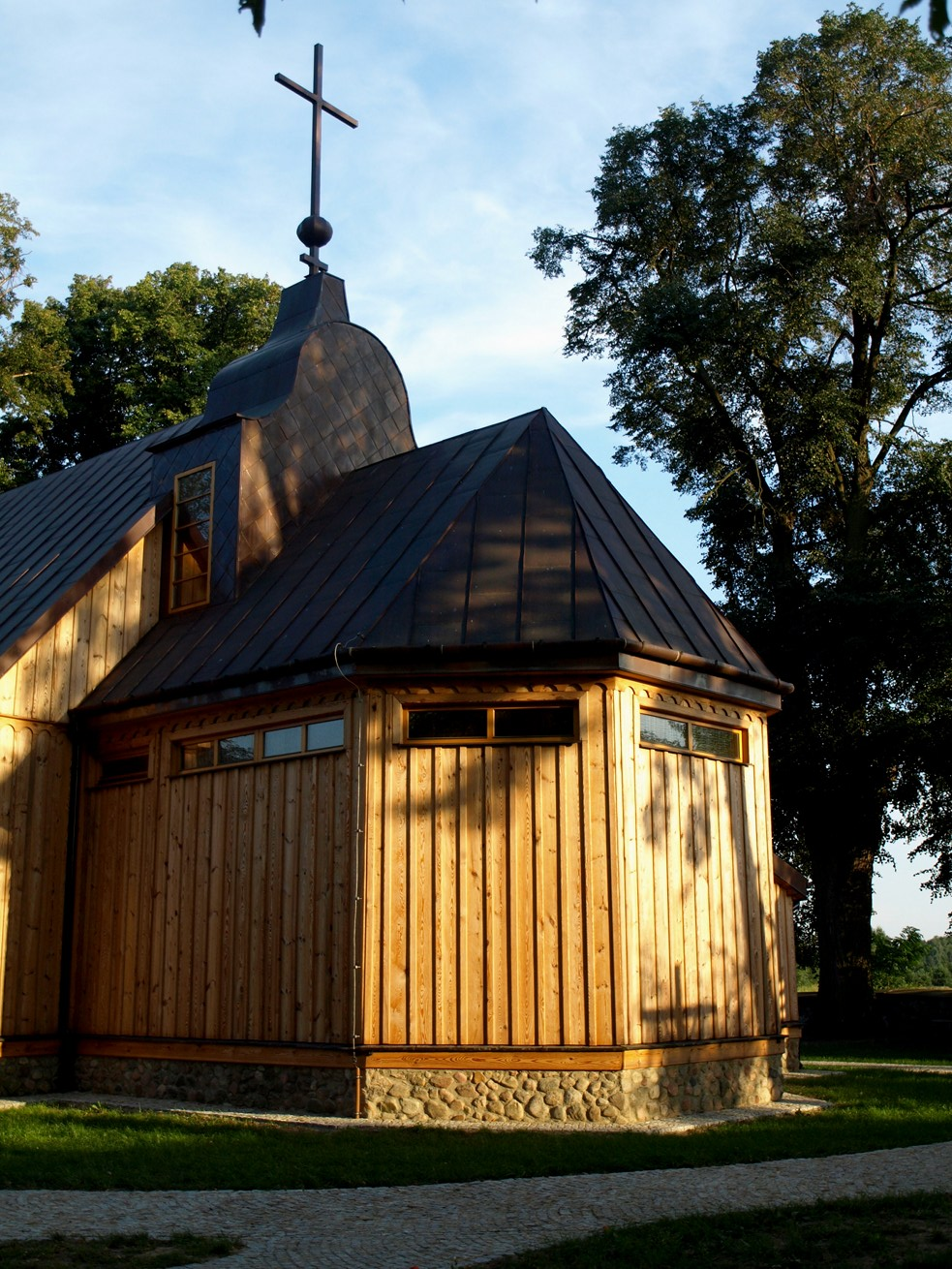 Drewniany kościół filialny p.w. św. Rocha w Sadykrzu (gmina Obryte)